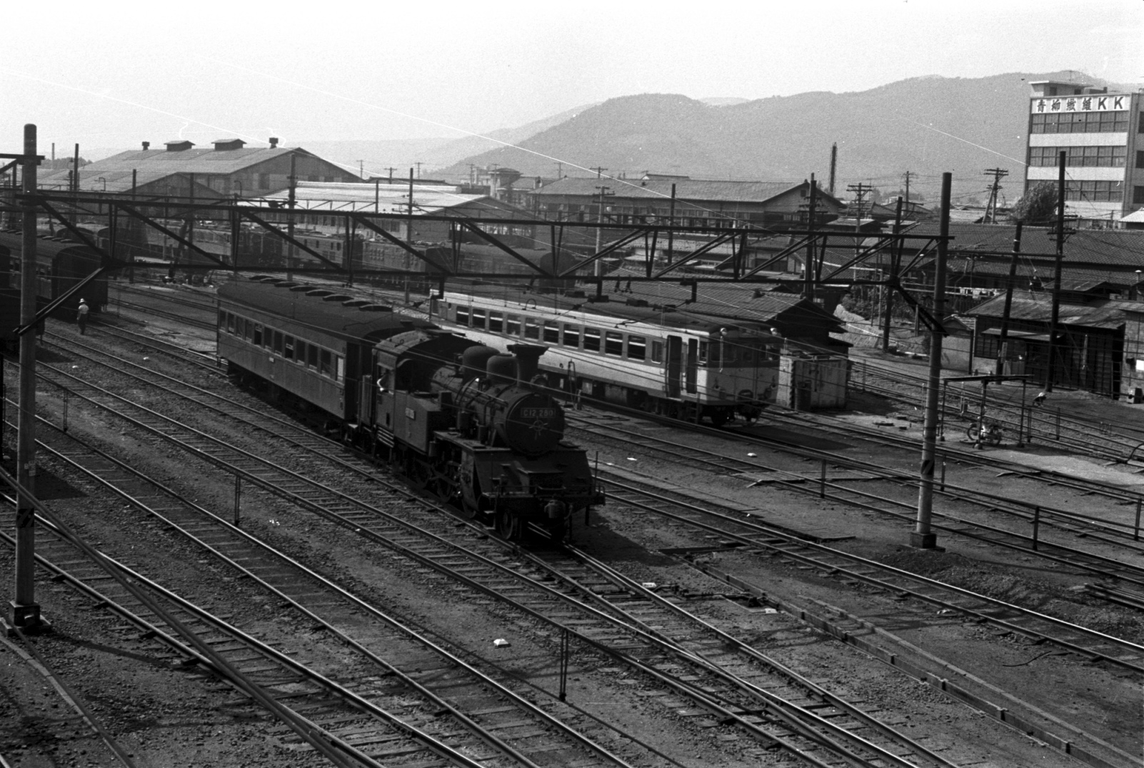 昭和41年7月の甲府駅北側の甲府機関区